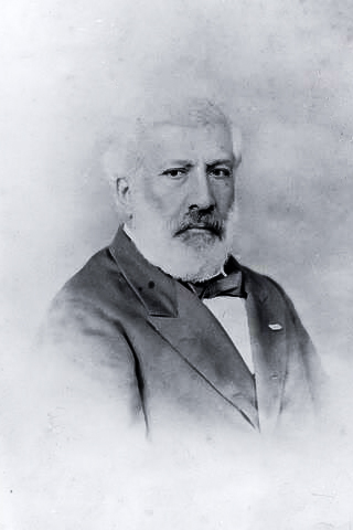 Manuel José de Araújo Porto-Alegre, primeiro e único barão de Santo Ângelo (Rio Pardo, 29 de novembro de 1806 — Lisboa, 30 de dezembro de 1879)